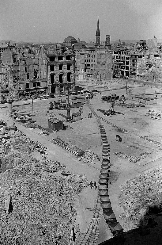 Original image description from the Deutsche Fotothek Blick über den Altmarkt zum Postplatz, Trümmerbeseitigung